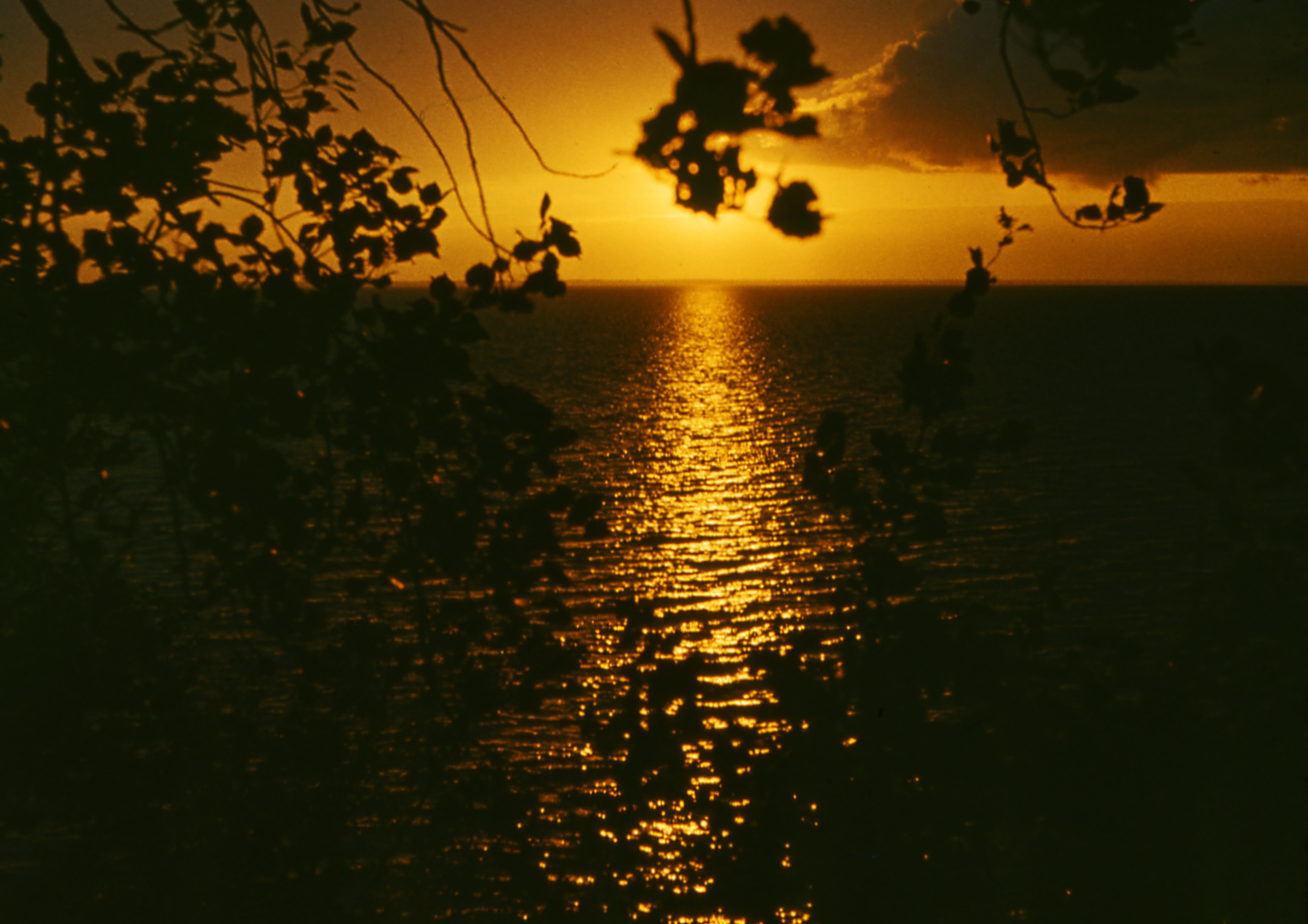 Päikeserada Võrtsjärvel.